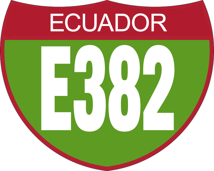 Disco de Identificación Vía Colectora E382